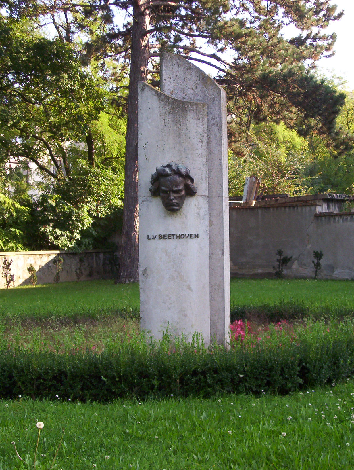 Beethovenova Busta v Hlohovci